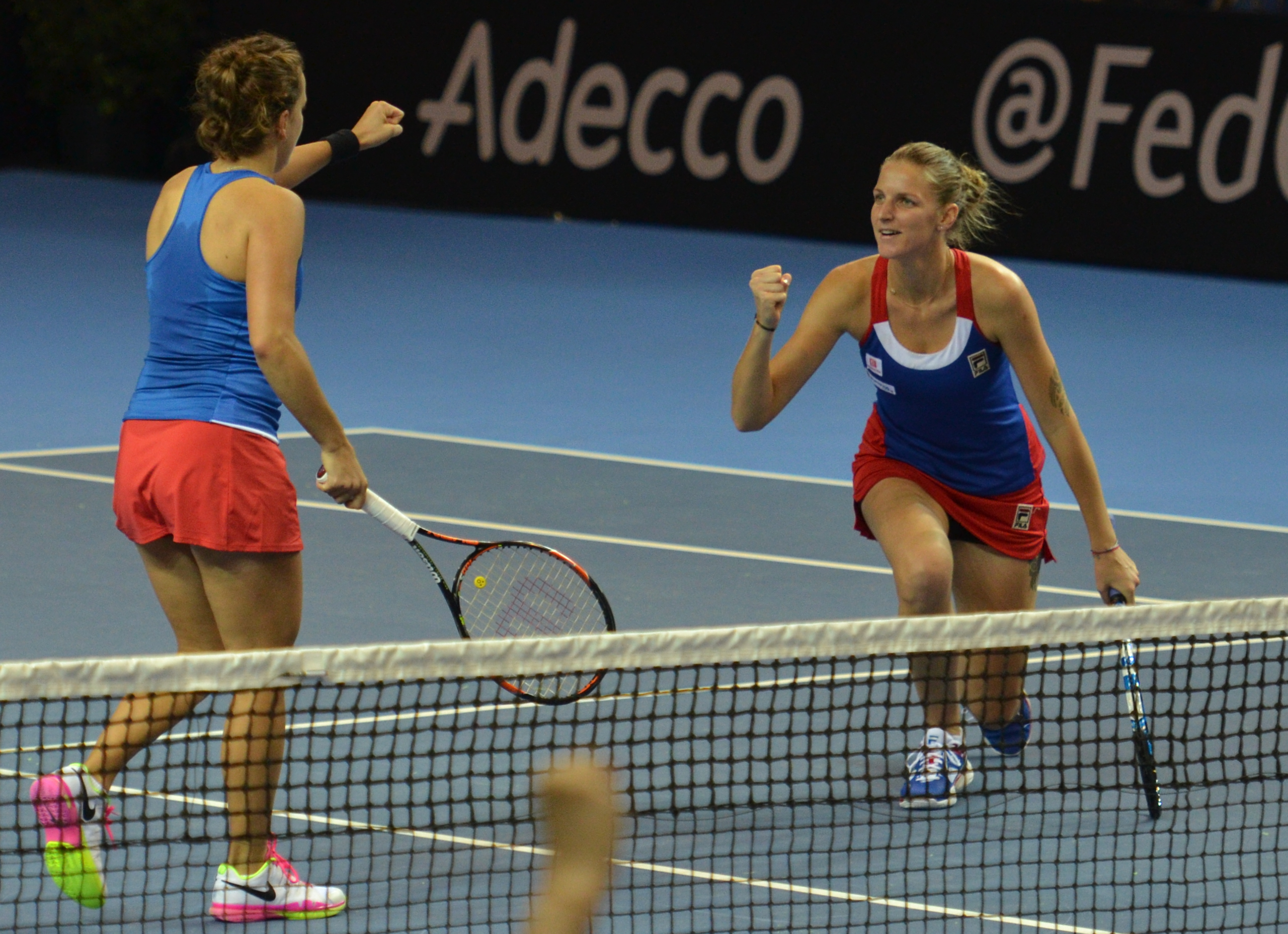 PPP_3398